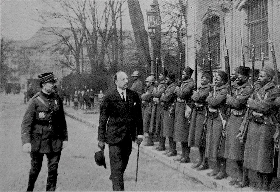 dans le journal L'Illustration de 1920